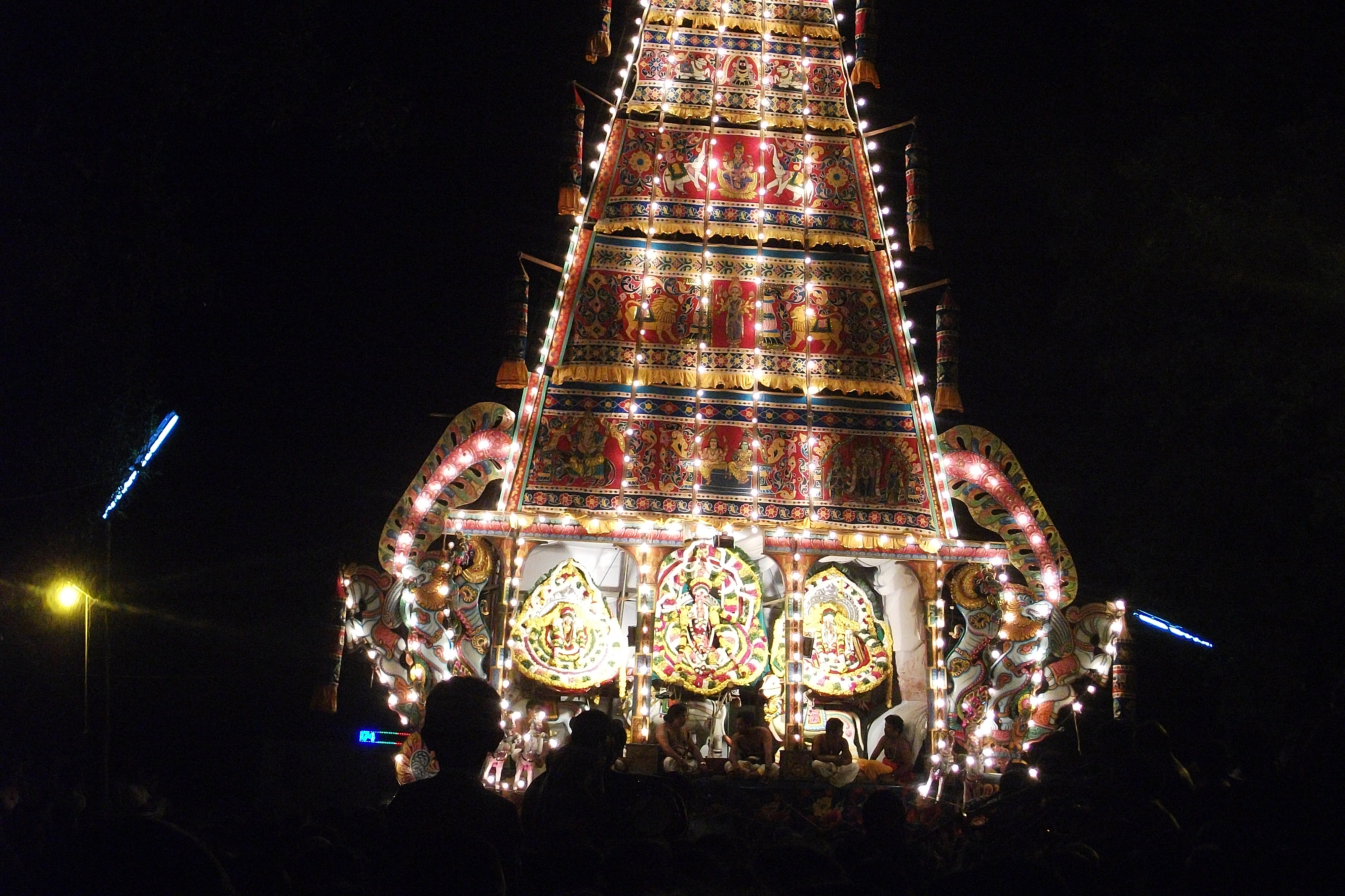 அம்பாள் சப்பரத்தில் காட்சி